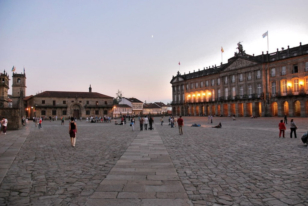 grande place devant la cathédrale